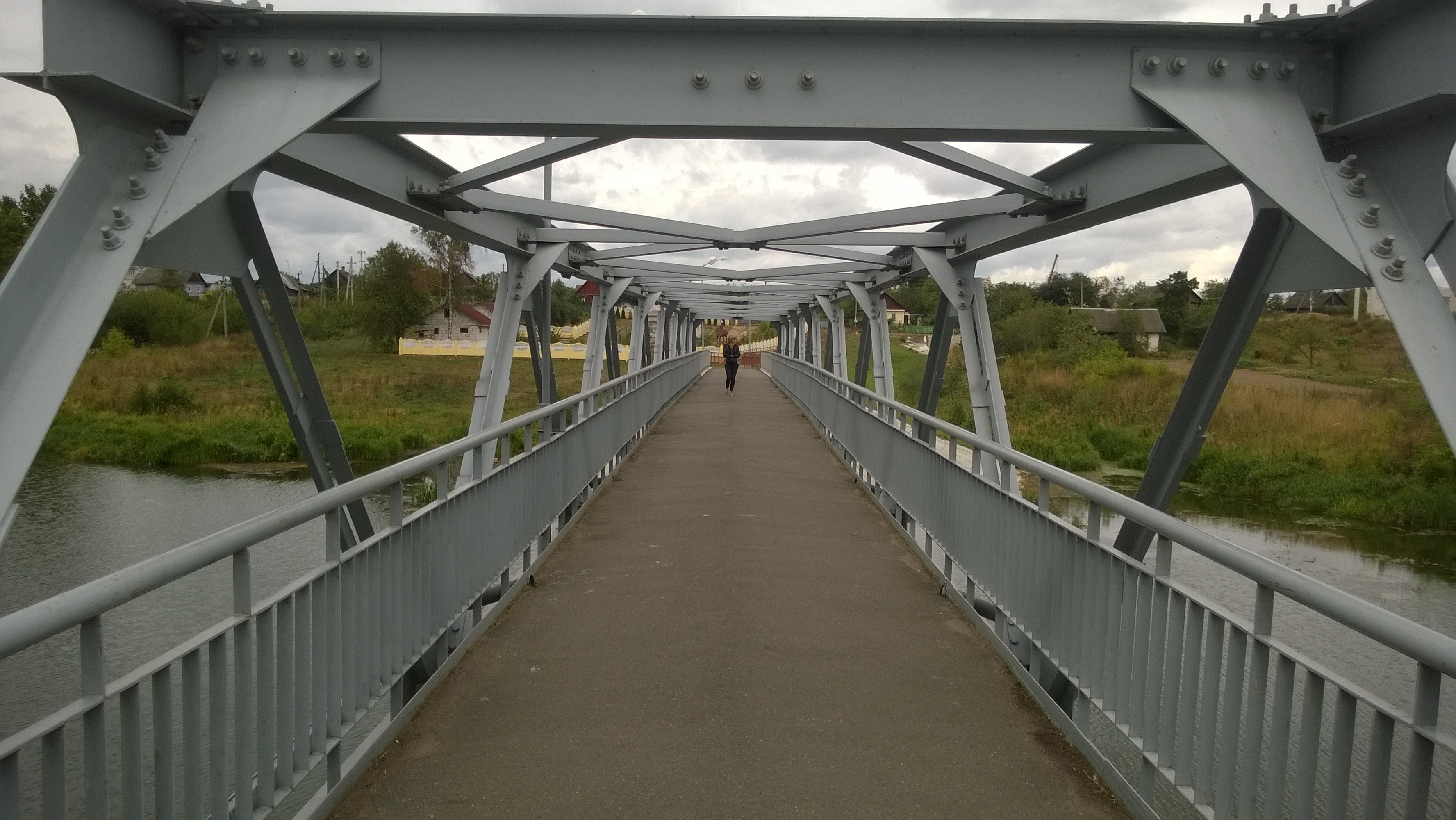 Grodna District, Belarus